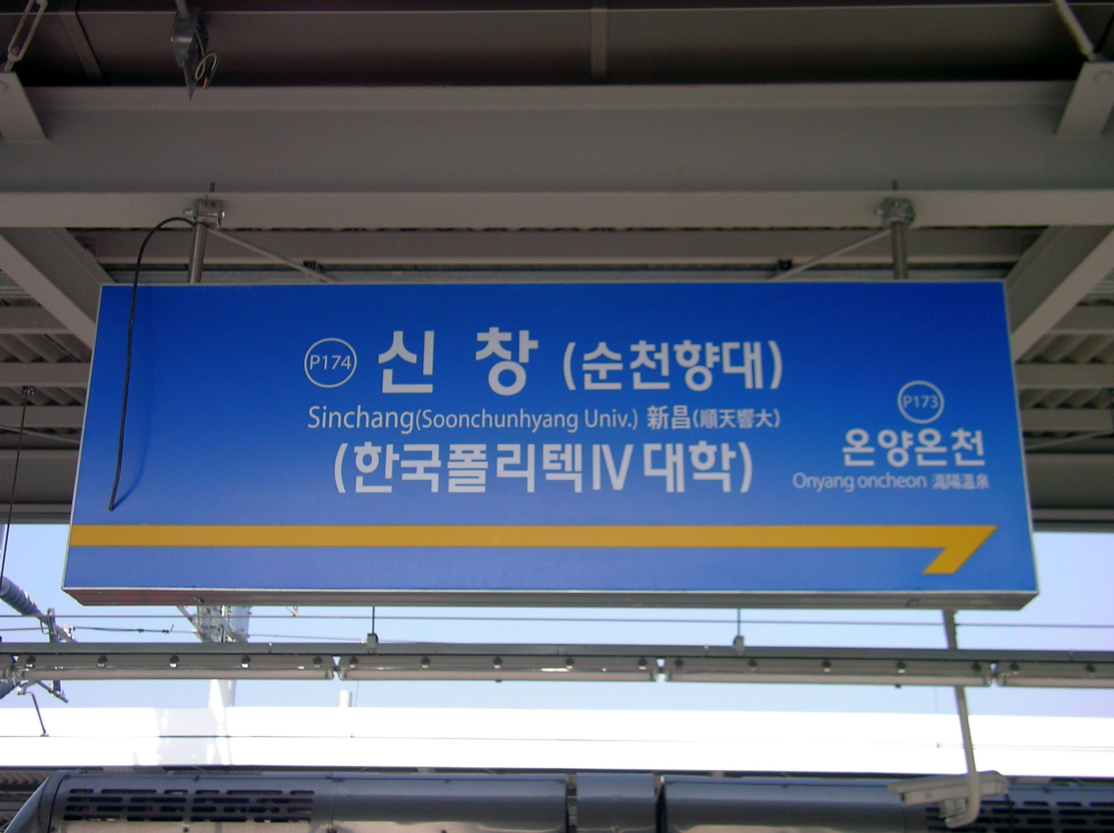 Sinchang Station (ko ja)